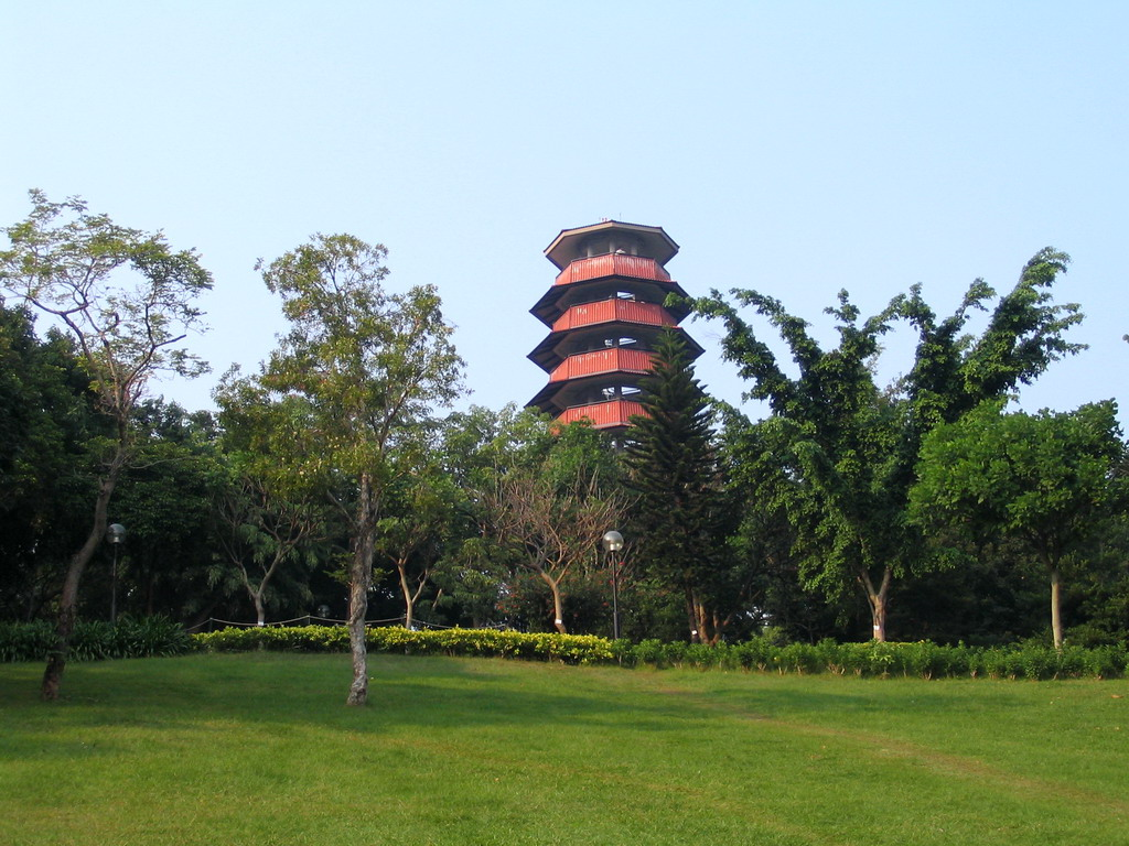 元朗公園 百鳥塔 Aviary Pagoda at Yuen Long Park